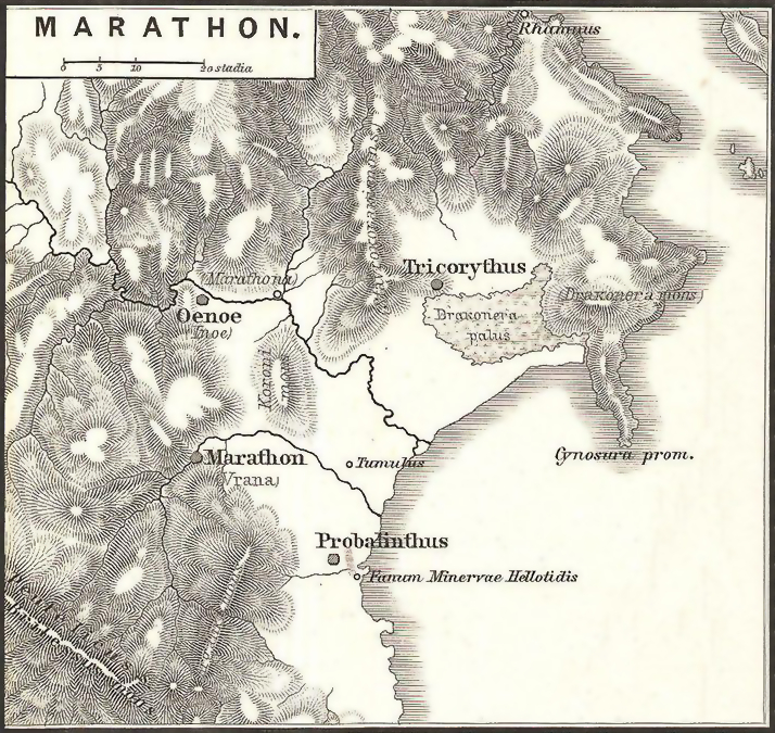 Particolare della mappa originale sul territorio di Maratona